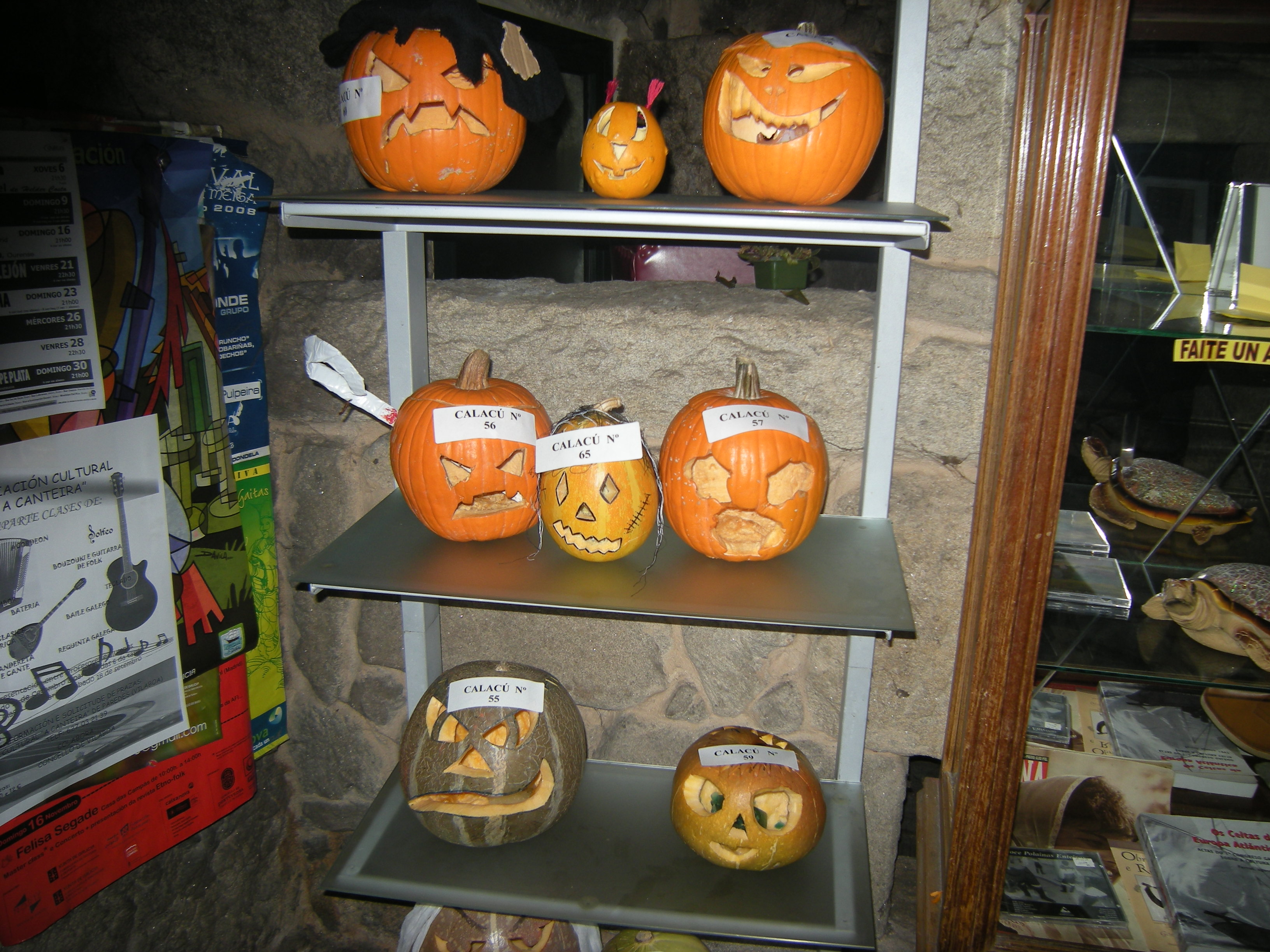 Concurso de calacús en el pub Casa dos Druidas. Varios calacús en un expositor.